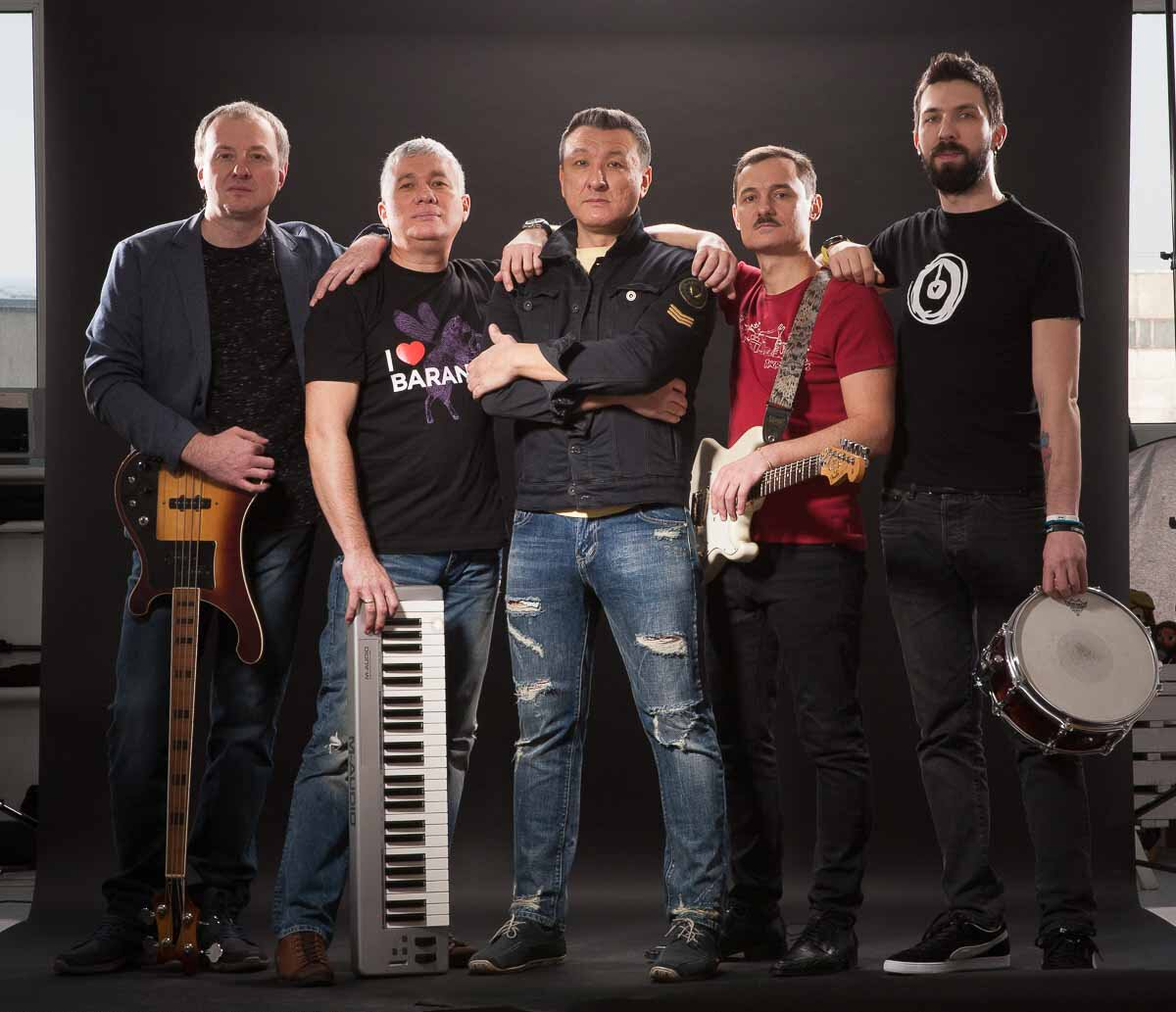 Текущий состав группы